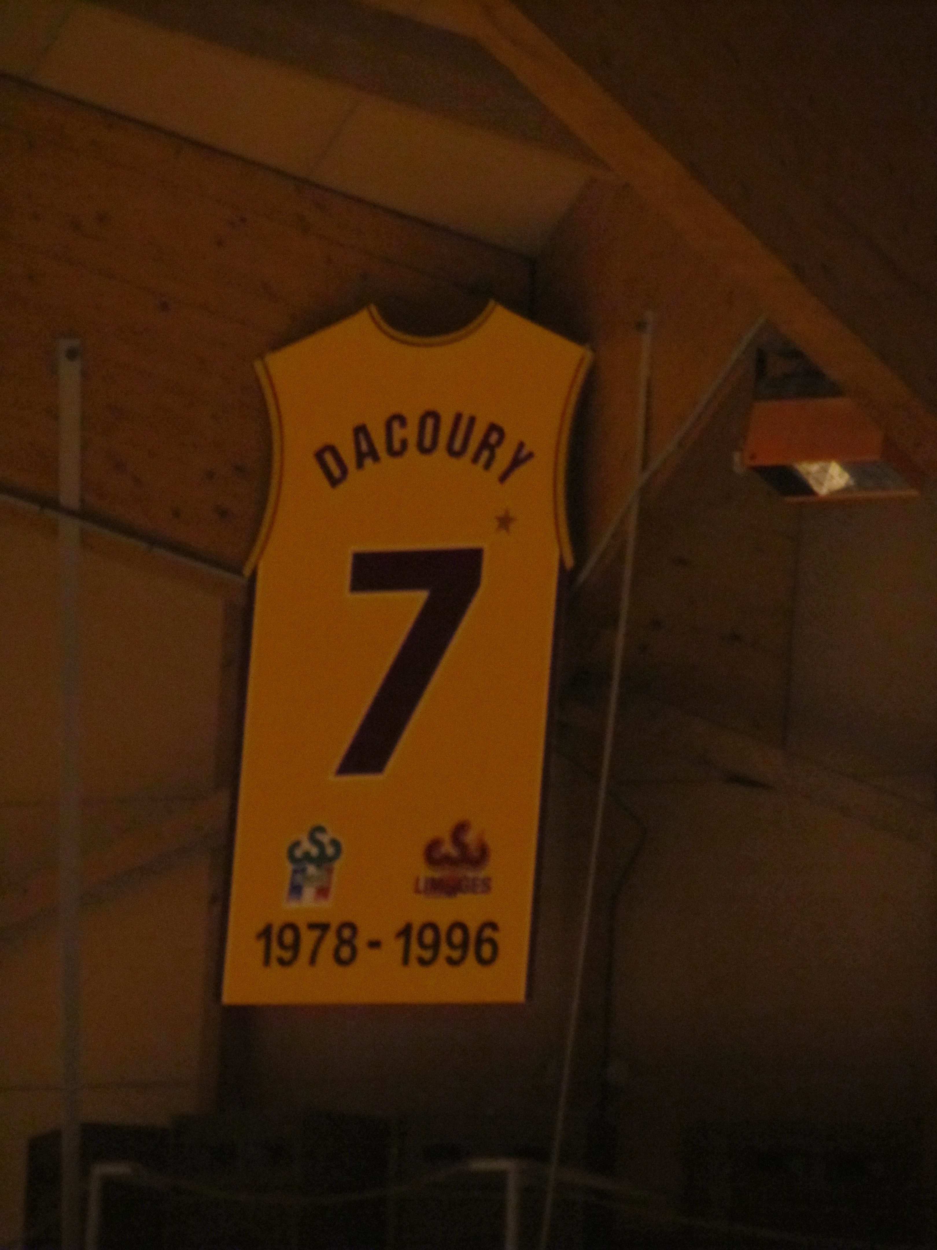 Le maillot retiré de Richard Dacoury à Beaublanc au club français de basket-ball Limoges CSP.